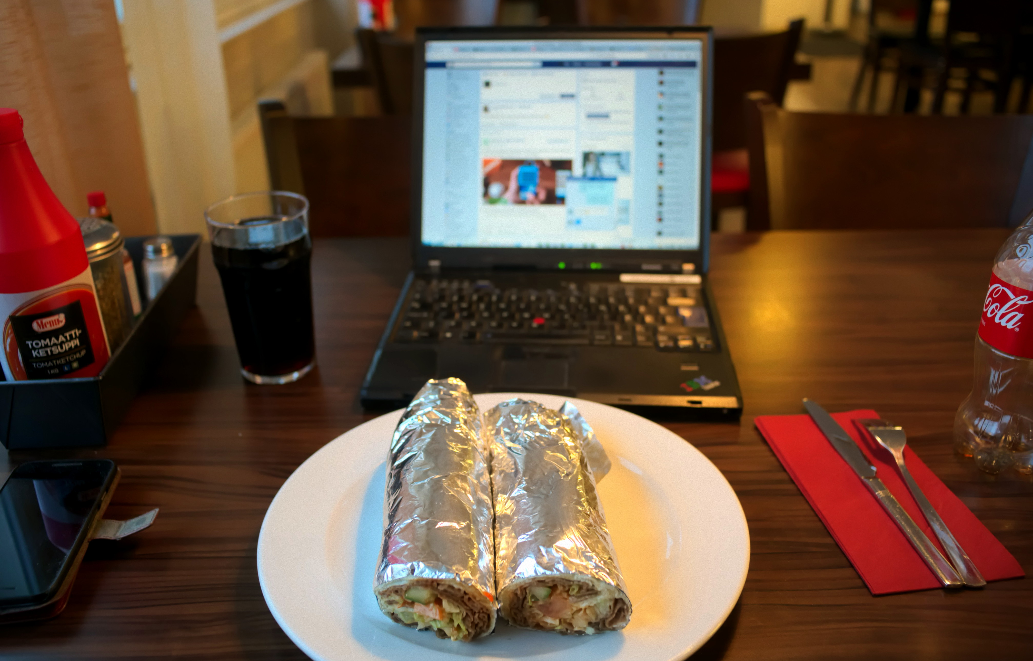 Rullakebab, Lappeenranta, helmikuu 2016